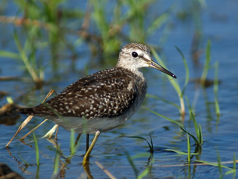 Tringa glareola 鷹斑鷸、林鷸